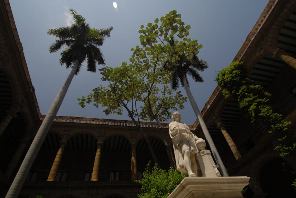 Cuba, augustus 2006, info in de Metadata